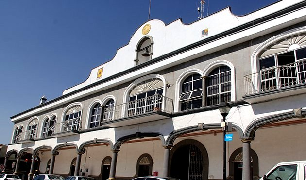 Ayuntamiento de Zacatelco